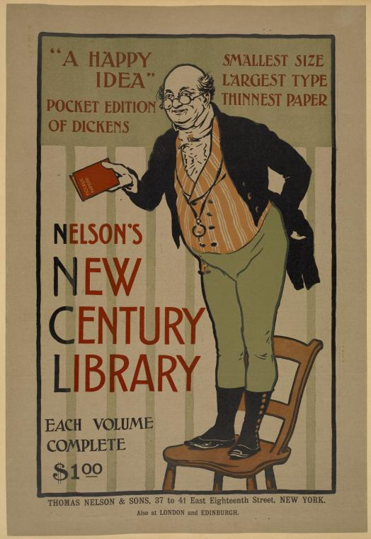 Publicité pour la collection New Century Library lancée en 1899 par la firme Thomas Nelson & Sons et destinée au marché américain.